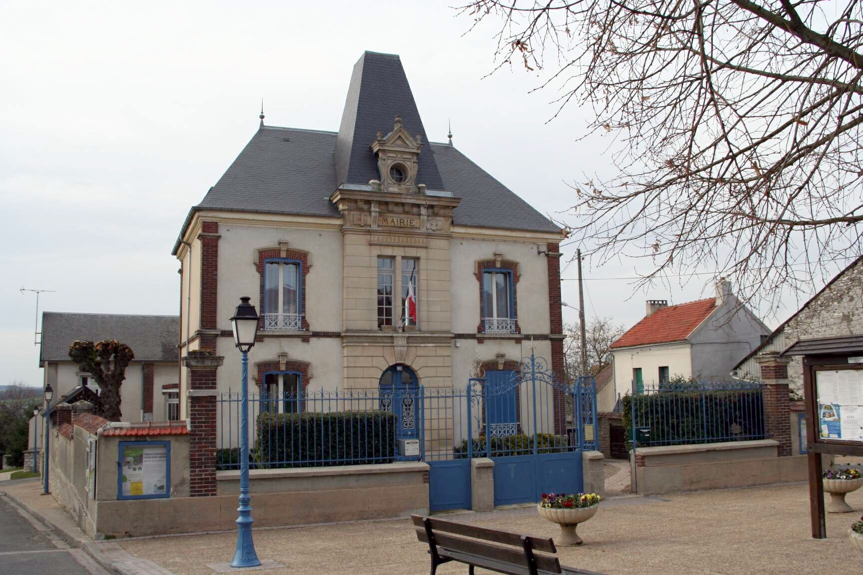 Mairie de Breuil-Bois-Robert - Yvelines (France)